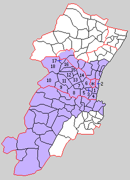 三重県安濃郡の町村制時点の町村。